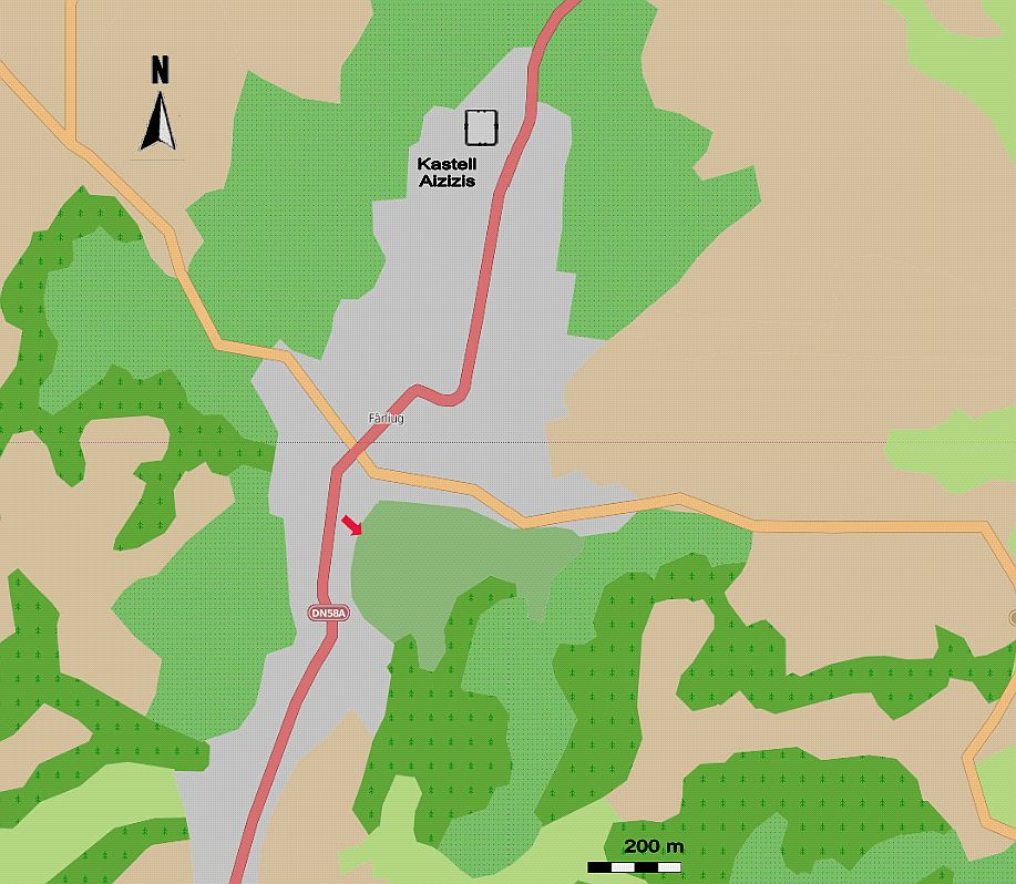 Lageskizze des Kastells von Färliug (RO).